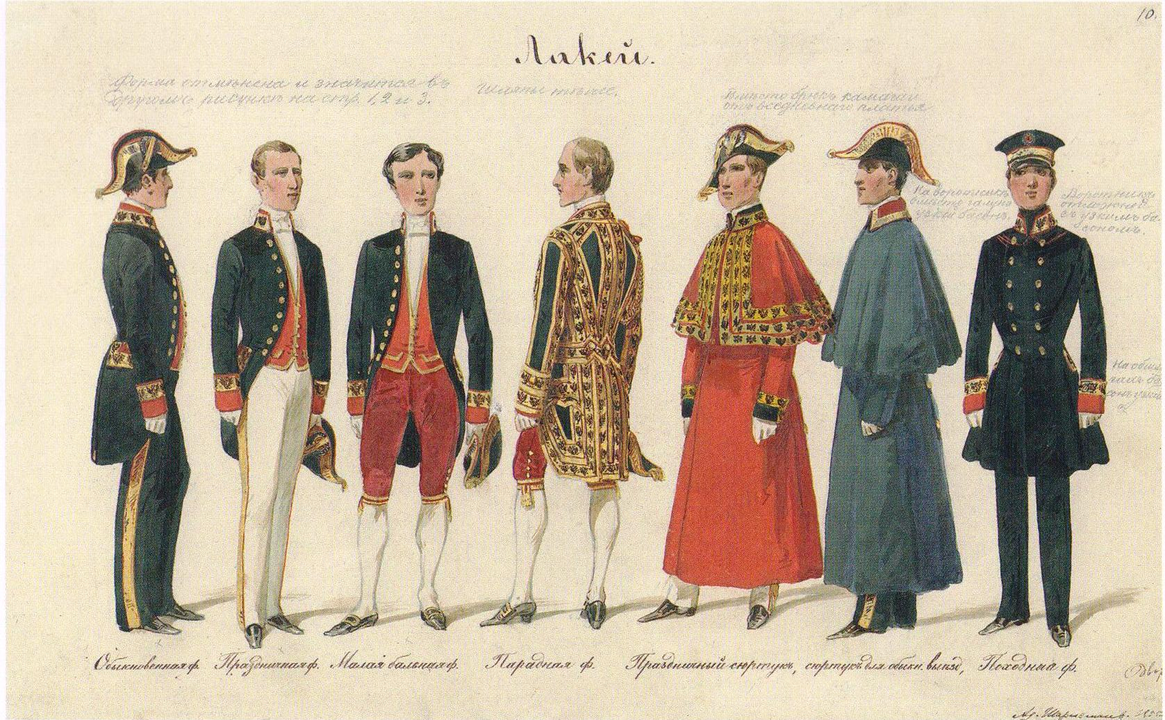 А. И. Шарлемань. Рисунки формы лакеев Высочайшего двора; 1855. 1. Обыкновенная форма; 2. Праздничная форма; 3. Малая бальная форма; 4. Парадная форма; 5. Праздничный сюртук; 6. Сюртук для обыкновенных выездов; 7. Походная форма